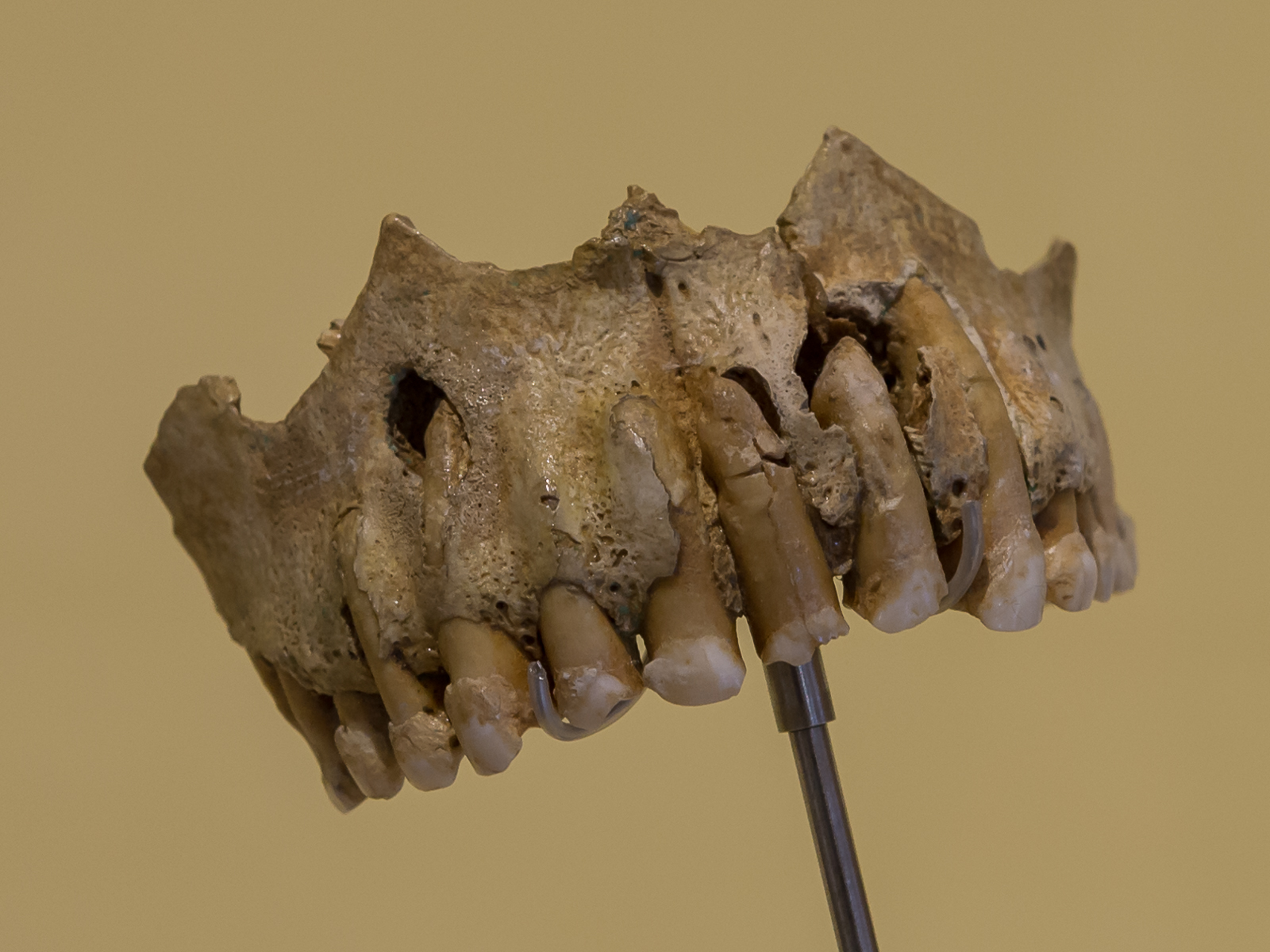 Grottes d'Arcy-sur-Cure, Grotte de l'Hyène, Neandertaler: Oberkiefer Individuum III aus Schicht 20 (Leroi-Gourhan) oder Schicht IVb6 (Abbé nAlexandre Parat) (Moustérien ancien).